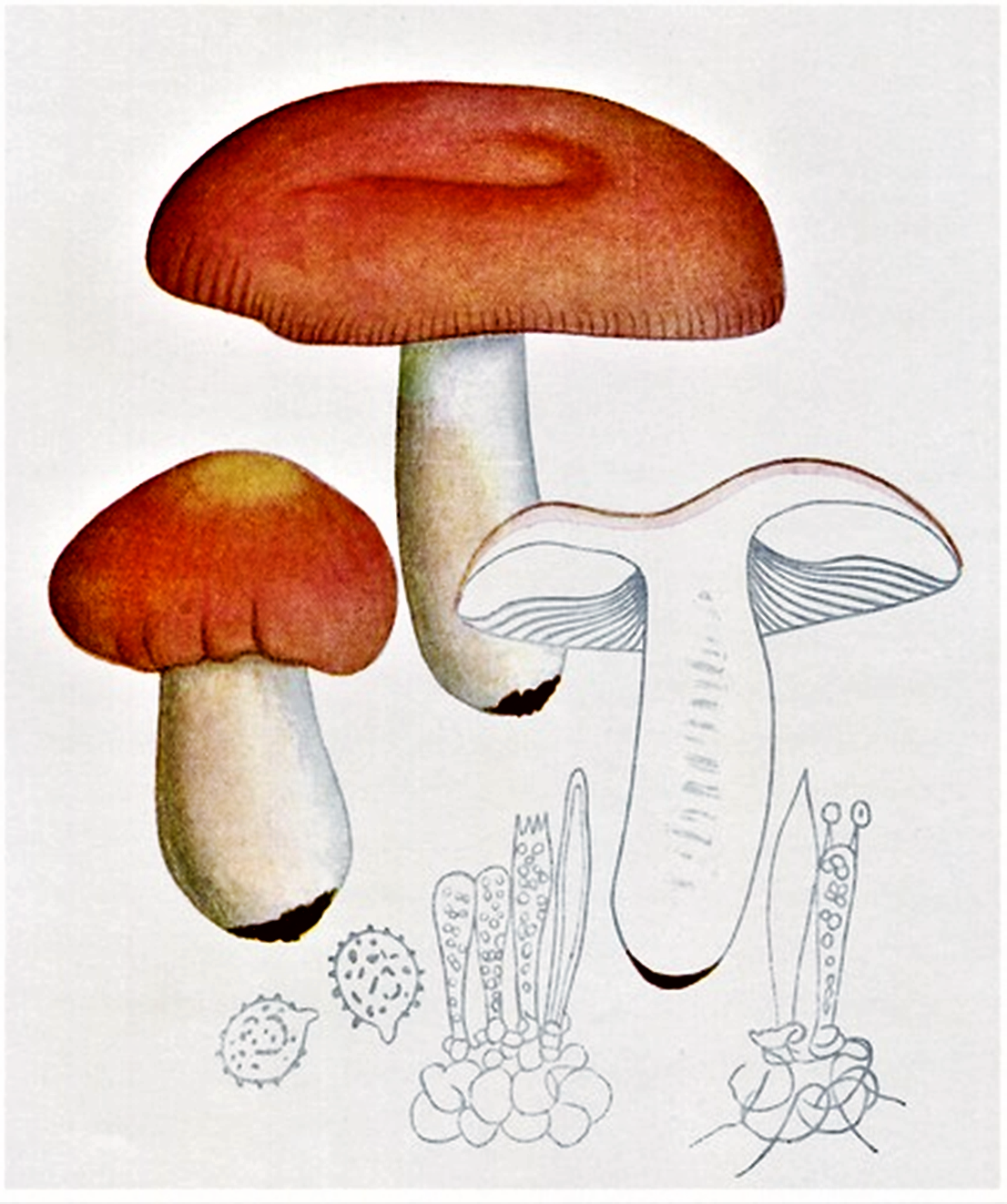 Giacomo Bresadola: Russula emetica (Schaeff., 1774) Pers. (1796)